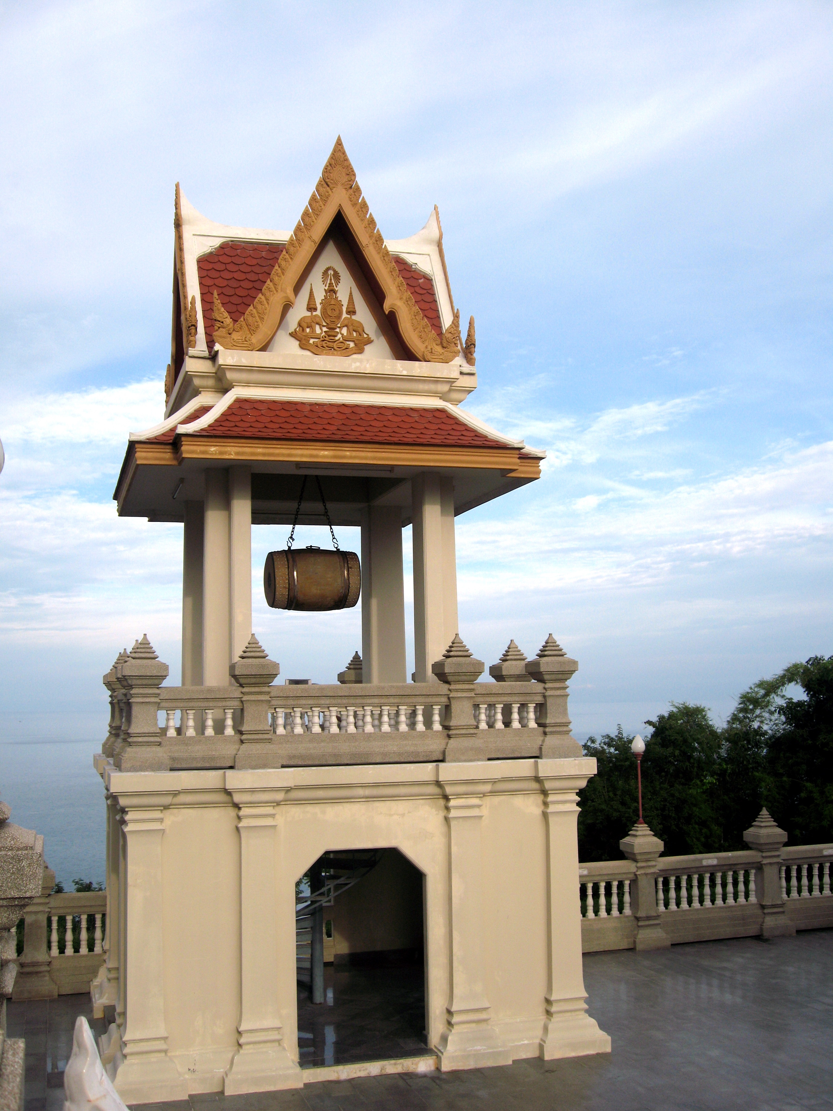 หอกลอง